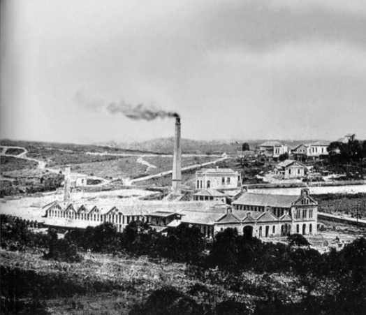 Cia. Cerâmica Vila Prudente em pleno funcionamento.